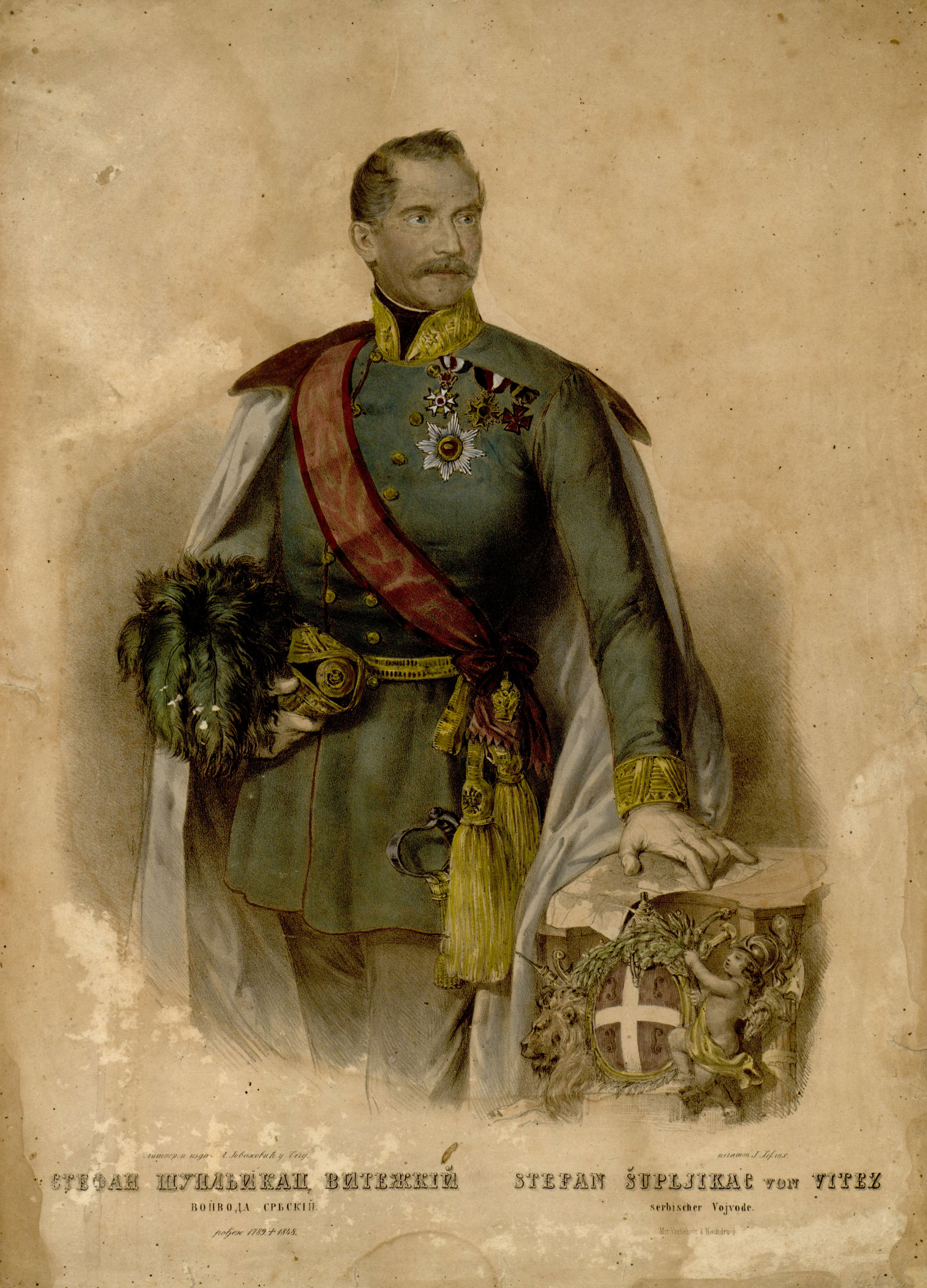 Lithograph of Stefan Šupljikac (Stevan Šupljikac) by Anastas Jovanović. Caption: литогр. и изда А. Іовановић у Бечу.печатио Ј. Херлих. СТЕФАН ШУПЛЬИКАЦ ВИТЕЖКІЙ ВОЙВОДА СРБСКІЙ Рођен 1789.+1848. STEFAN ŠUPLJIKAC von VITEZ SERBISCHER VOJVODE. Mit Vorbehalt d Nachdruck